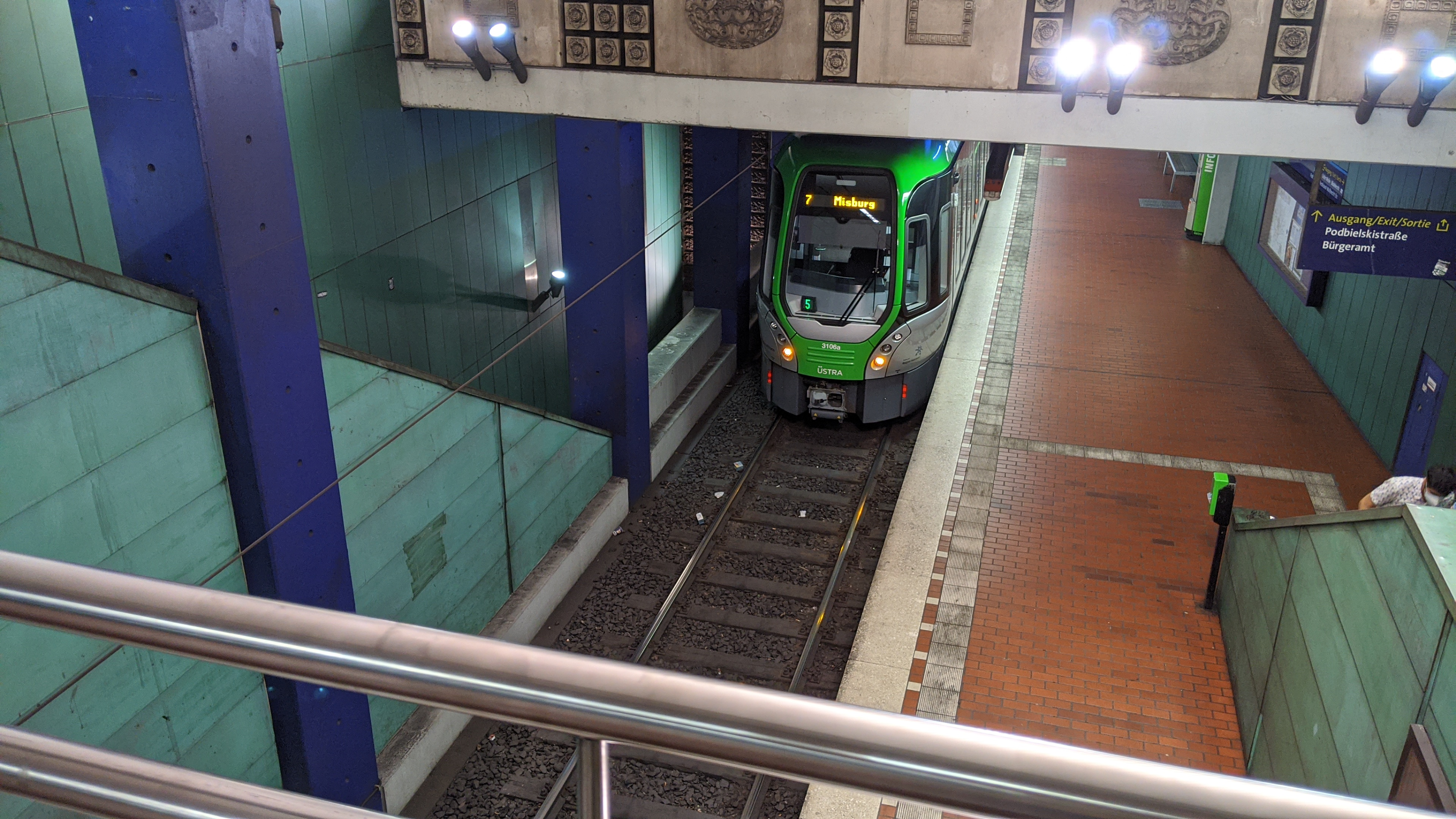 Stadtbahn Hannover, U-Bahnhof Lister Platz, Blick von der Verteilerebene (Ebene -1) auf den oberen Bahnsteig Richtung Norden (Ebene -2). Links: Rolltreppe zum unteren Bahnsteig Richtung Süden (Ebene -3). Der Bahnhof hat zwei eingleisige Bahnsteige untereinander. Taken on 28 June 2020